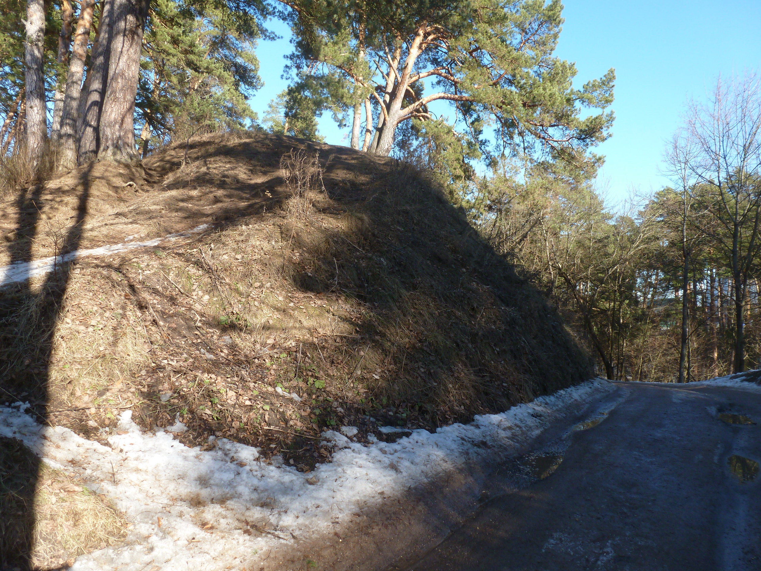 Городок (Звенигород), вал кремля. Март 2015 года.